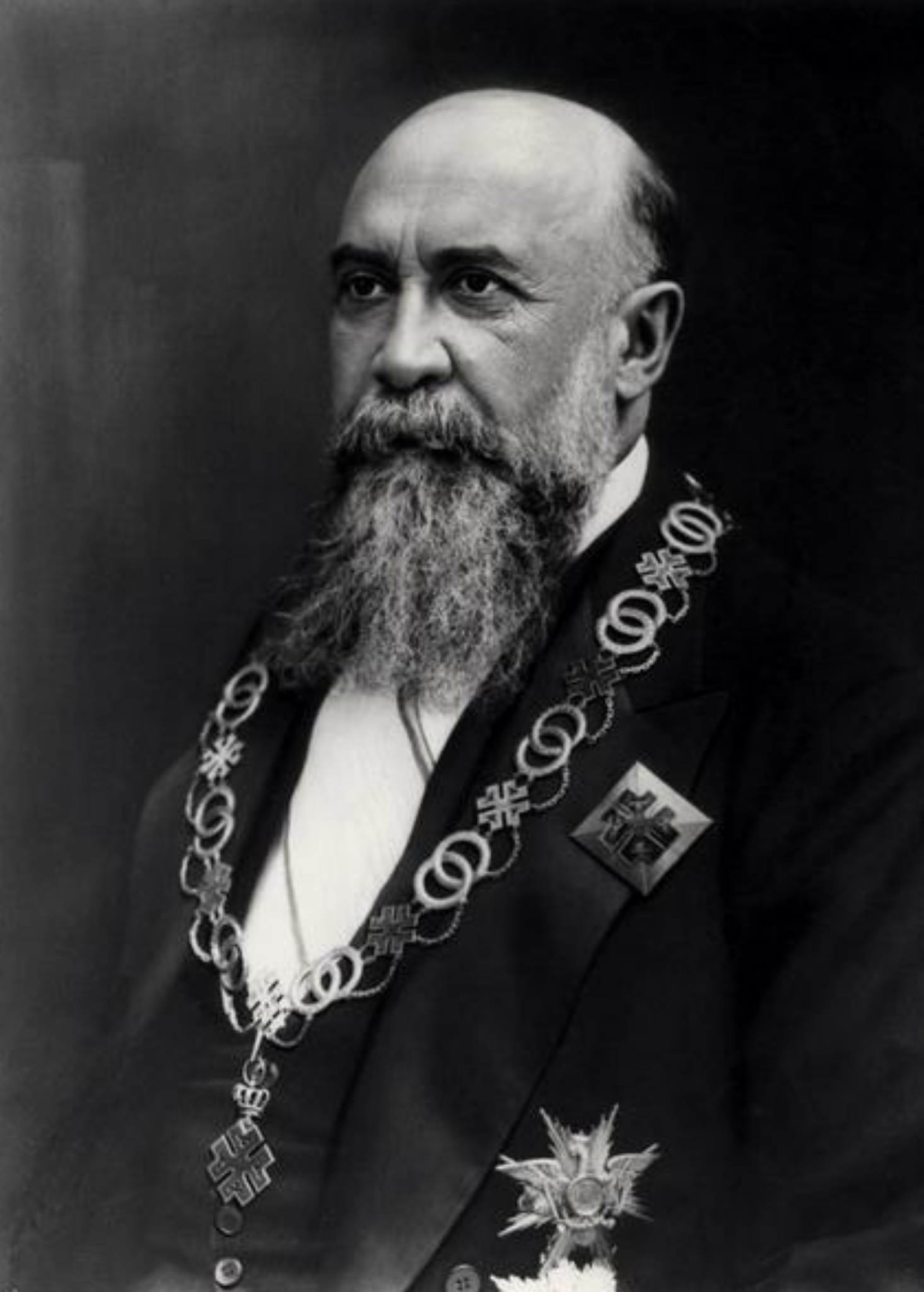 Nicolae Iorga portret